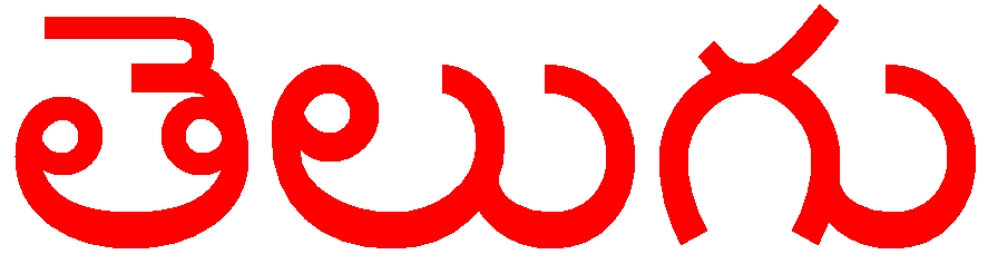 das Wort Telugu in Telugu-Schrift